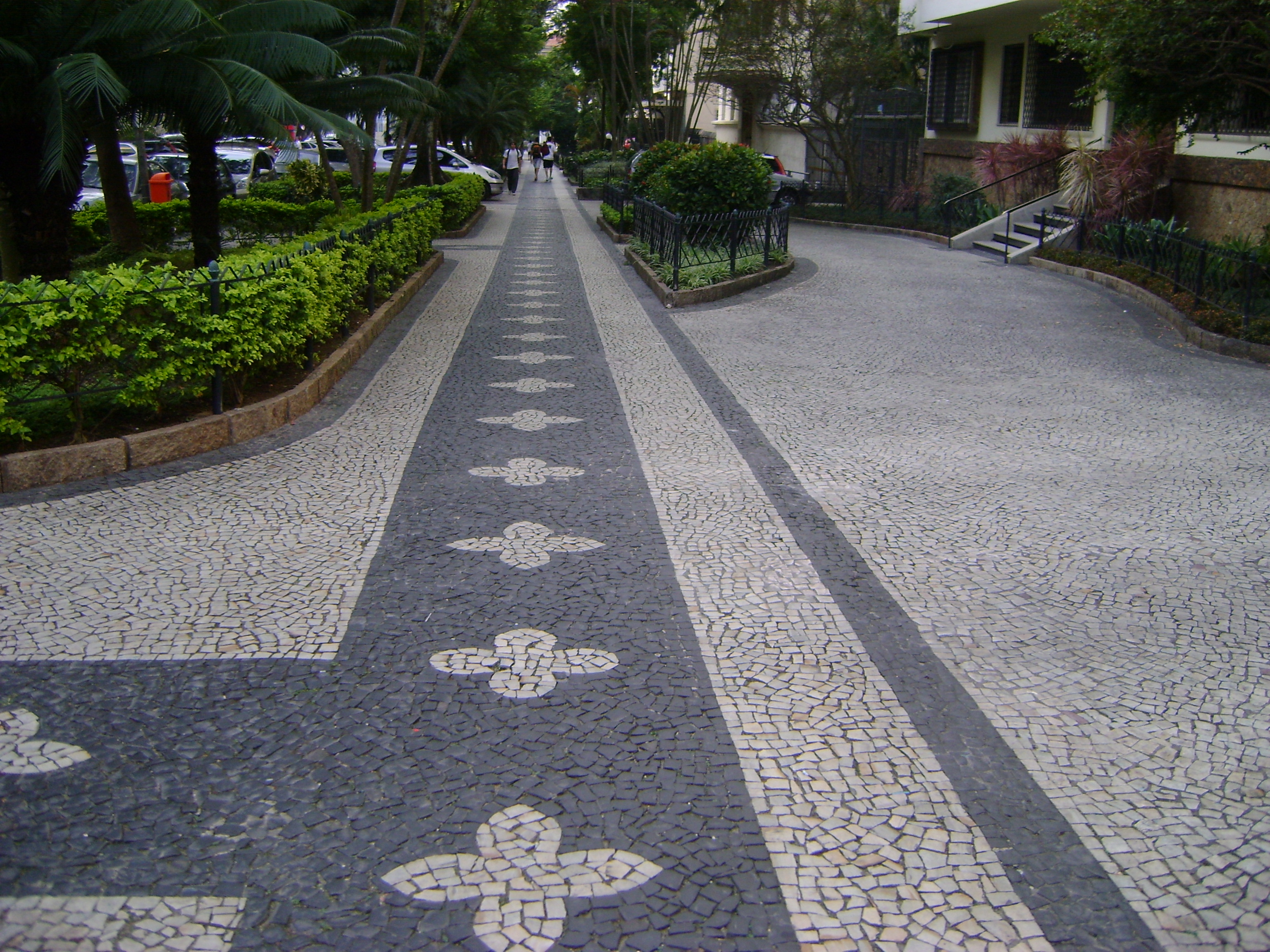 Rua General Glicério, no Jardim Laranjeiras, Laranjeiras, Rio de Janeiro, Brasil.